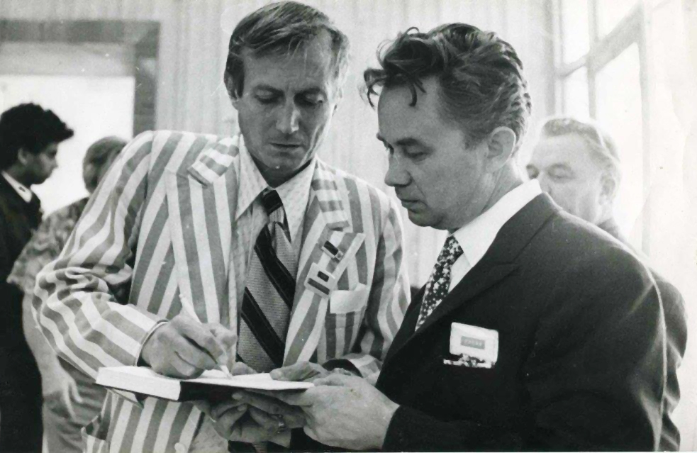 Игорь Юровский с Евгением Евтушенко